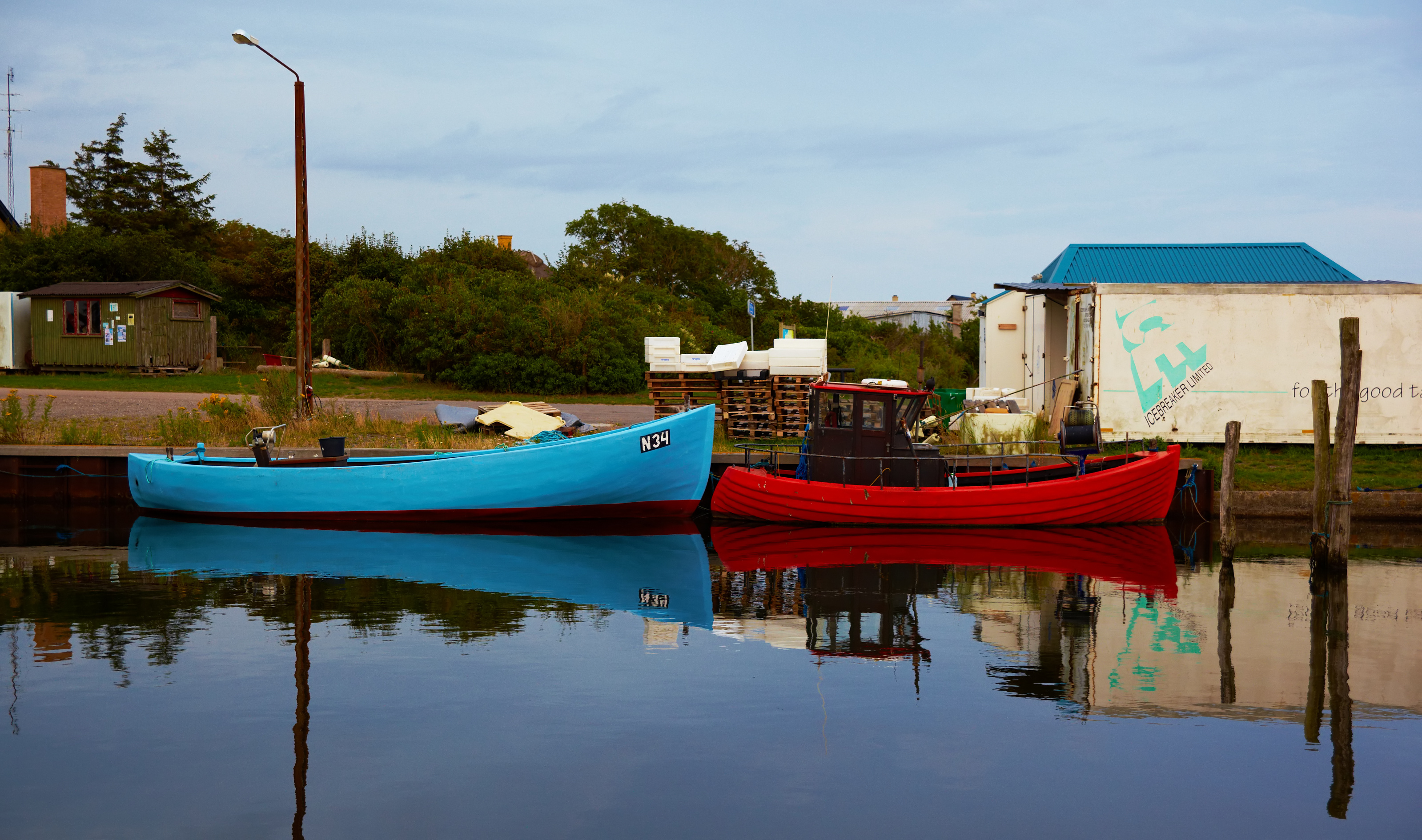 Kramnitse havn